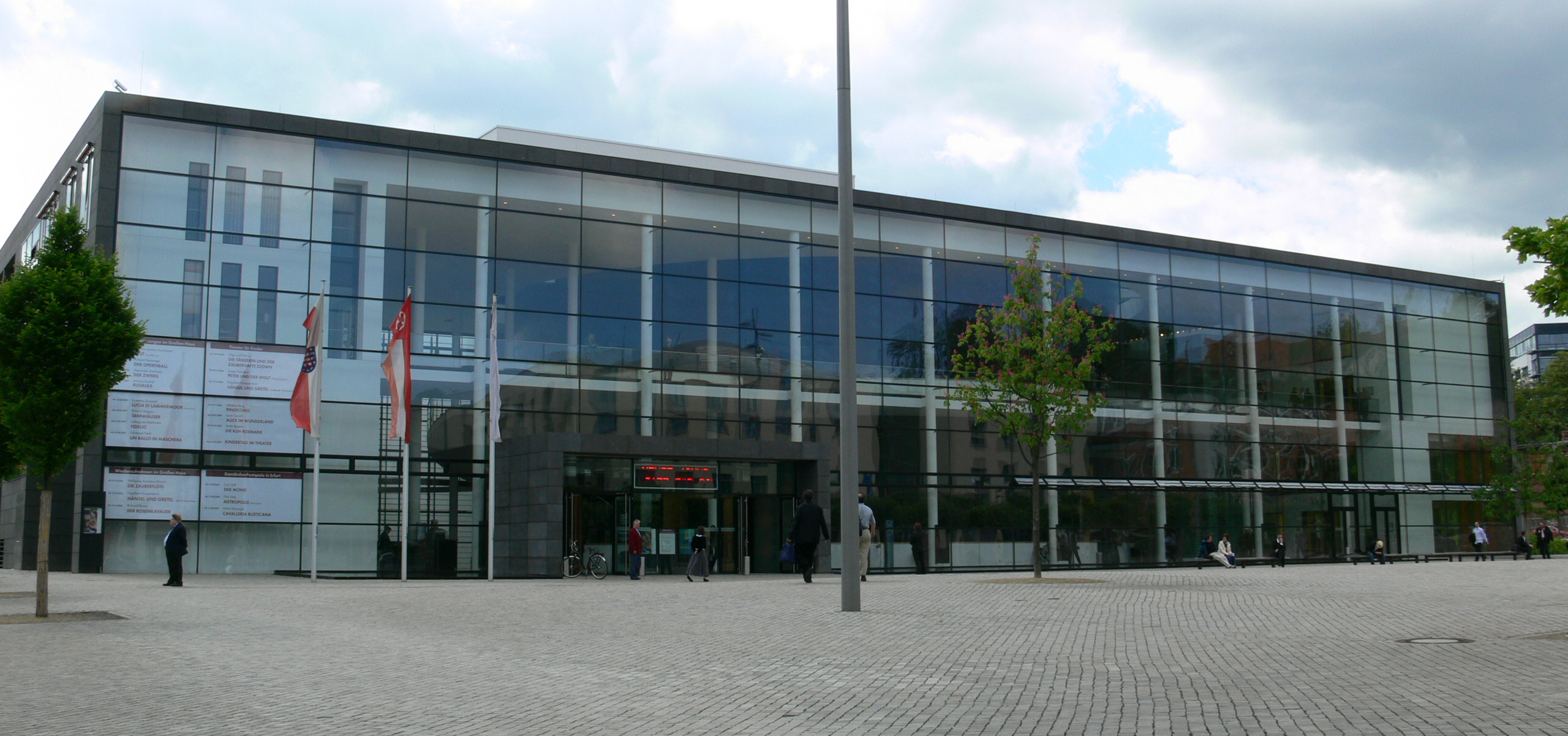 Theater Erfurt (errichtet zwischen 1999 und 2003) - Theaterplatz 1, Erfurt, Thüringen, Deutschland